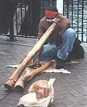 eigen foto